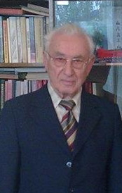 Генерал-майор, участник Афганской войны Омар Муртазалиев